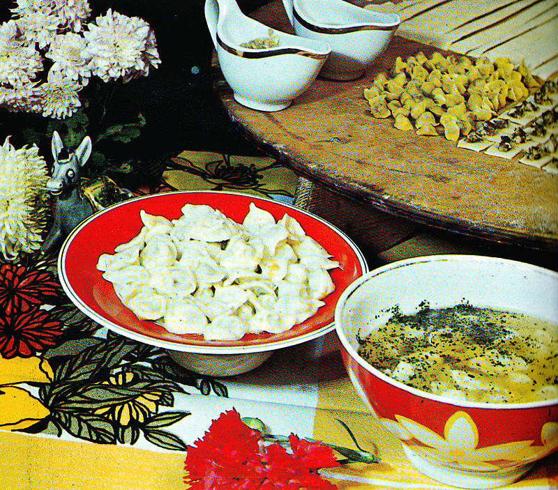 აზერბაიჯანული, ტრადიციული კერძი "დუშბარა".